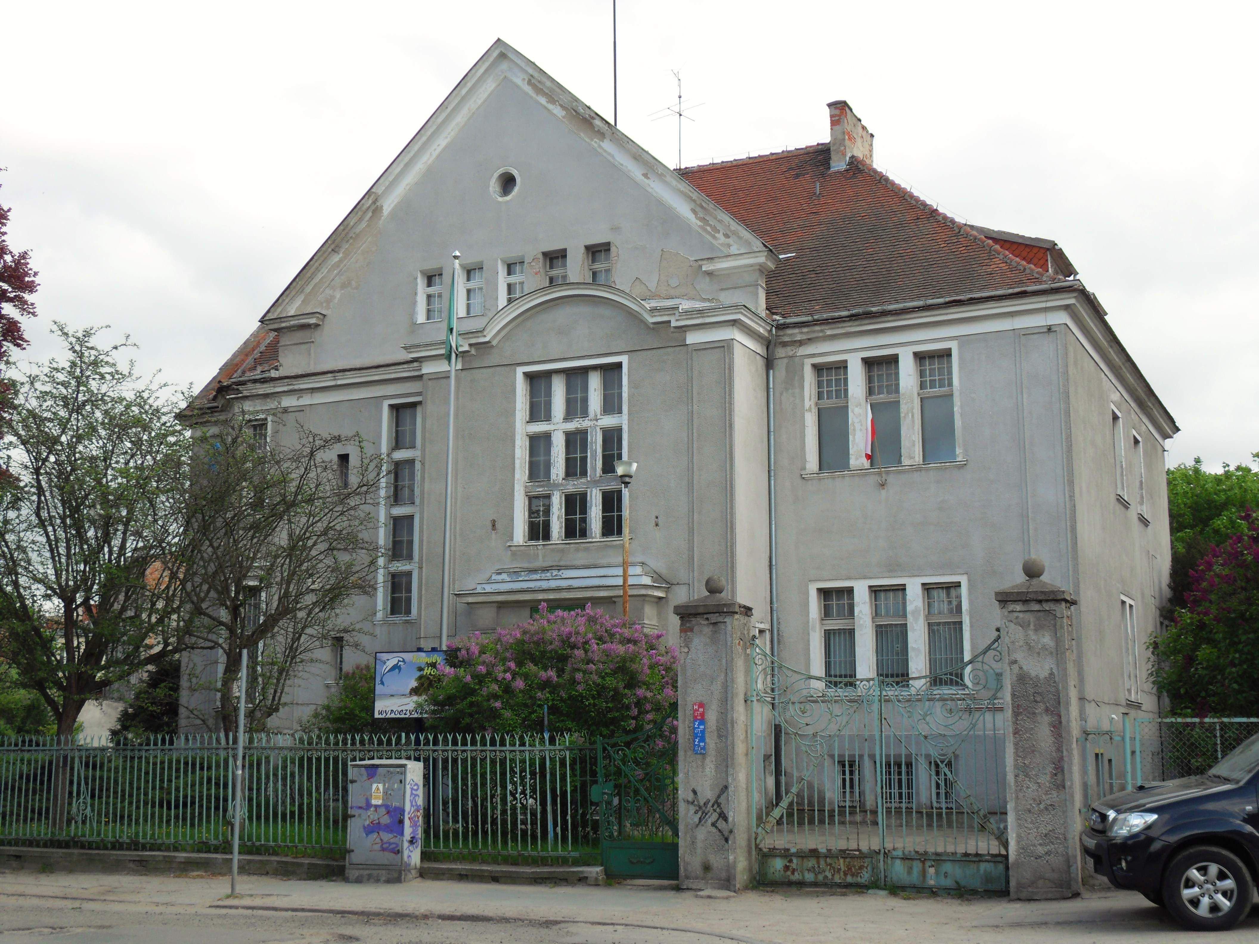 Gdańsk Wrzeszcz Górny, ul. Małachowskiego 1 - willa, 1910)